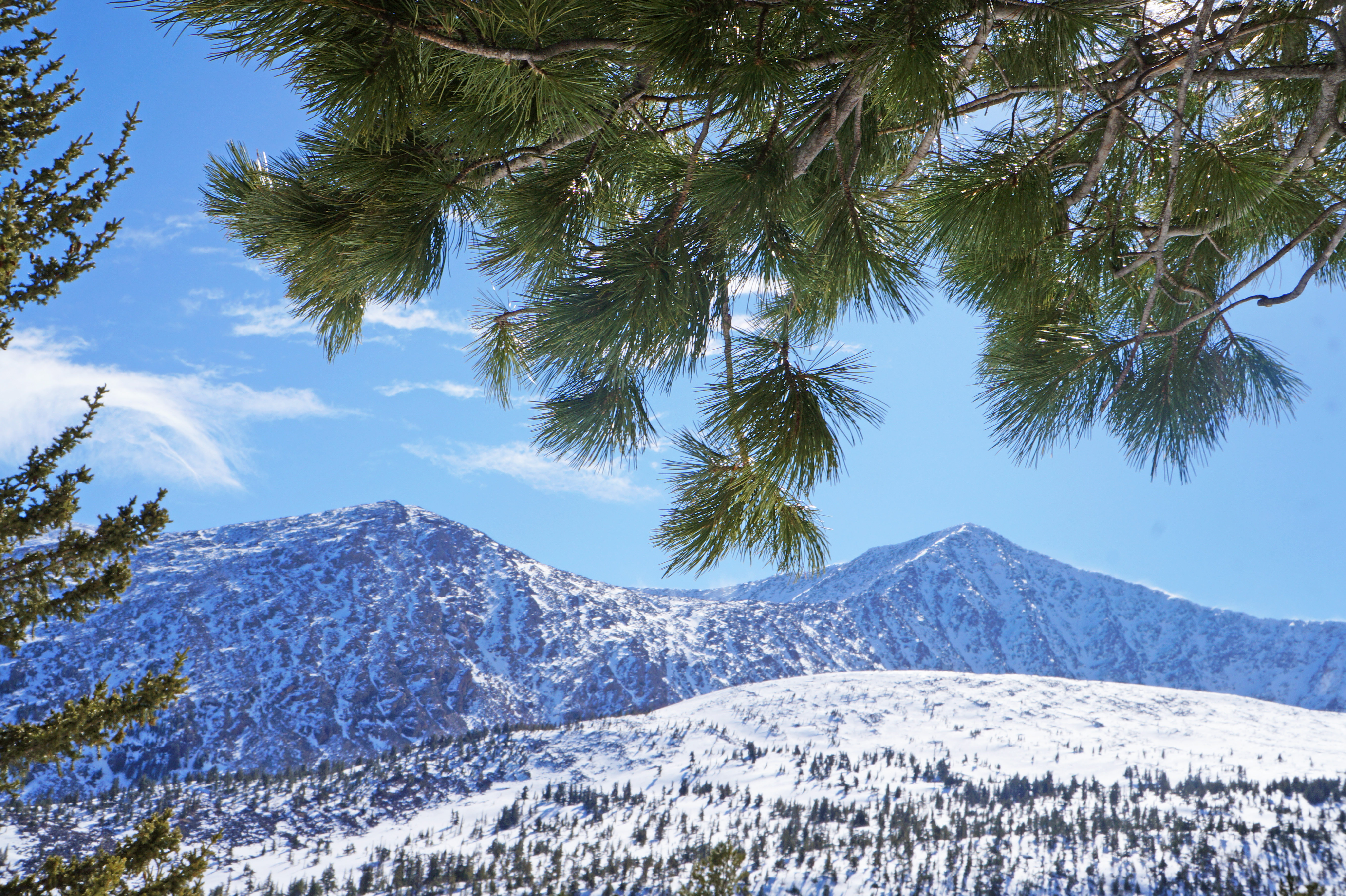 Хребет Борус распаложен на северном макросклоне Западного Саяна в горном лесничестве национального парка "Шушенский бор". Фото Элинор Пэйт This image is related to the protected area of Russia number 2400223